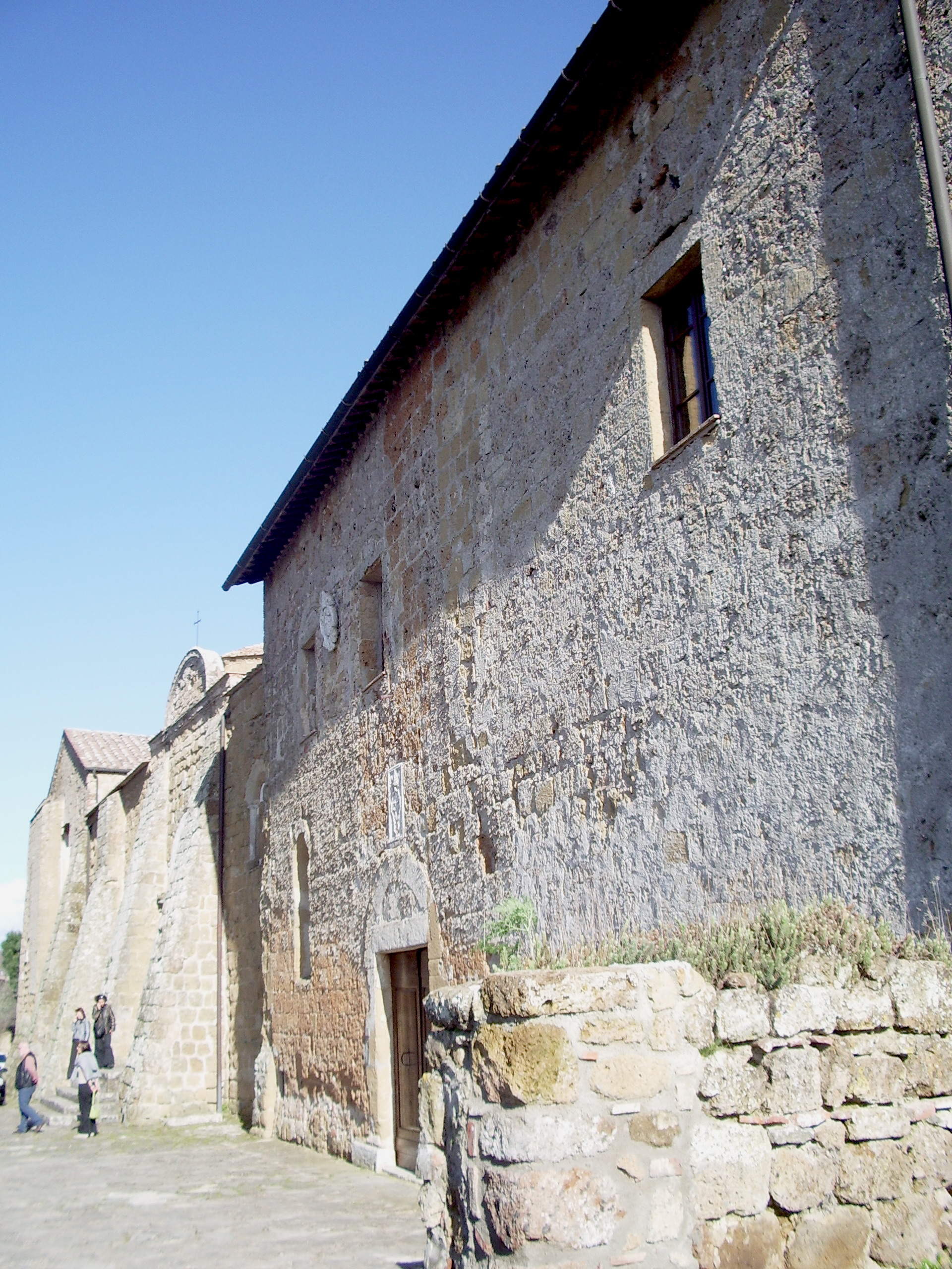 Il Palazzo Vescovile e la facciata laterale sinistra del Duomo di Sovana